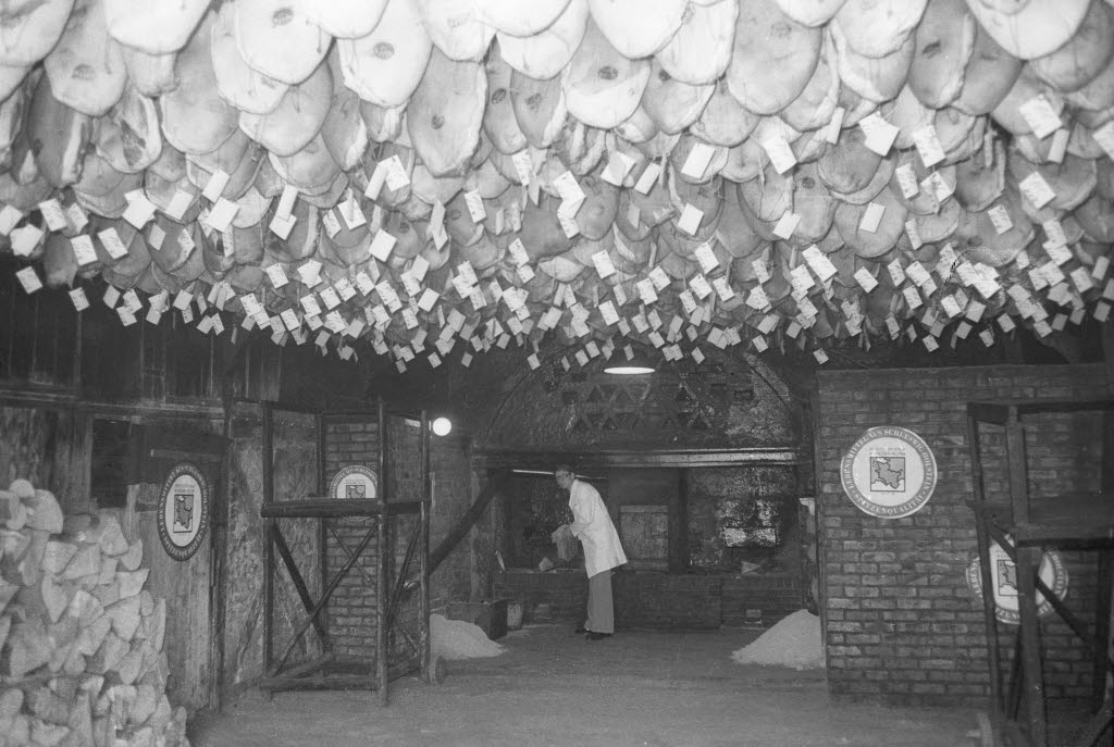 Durchschnittlich sechs bis acht Wochen hängen die Schinken im Rauch. Die Katenschinkenräucherei befindet sich seit drei Generationen im Besitz der Familie Nagel.